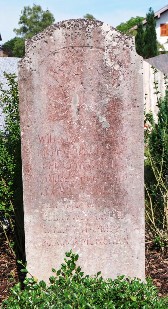 Grab des Wirtschaftsgeographen Wilhelm Credner (1892-1948) auf dem Gemeindefriedhof Zell in Schäftlarn